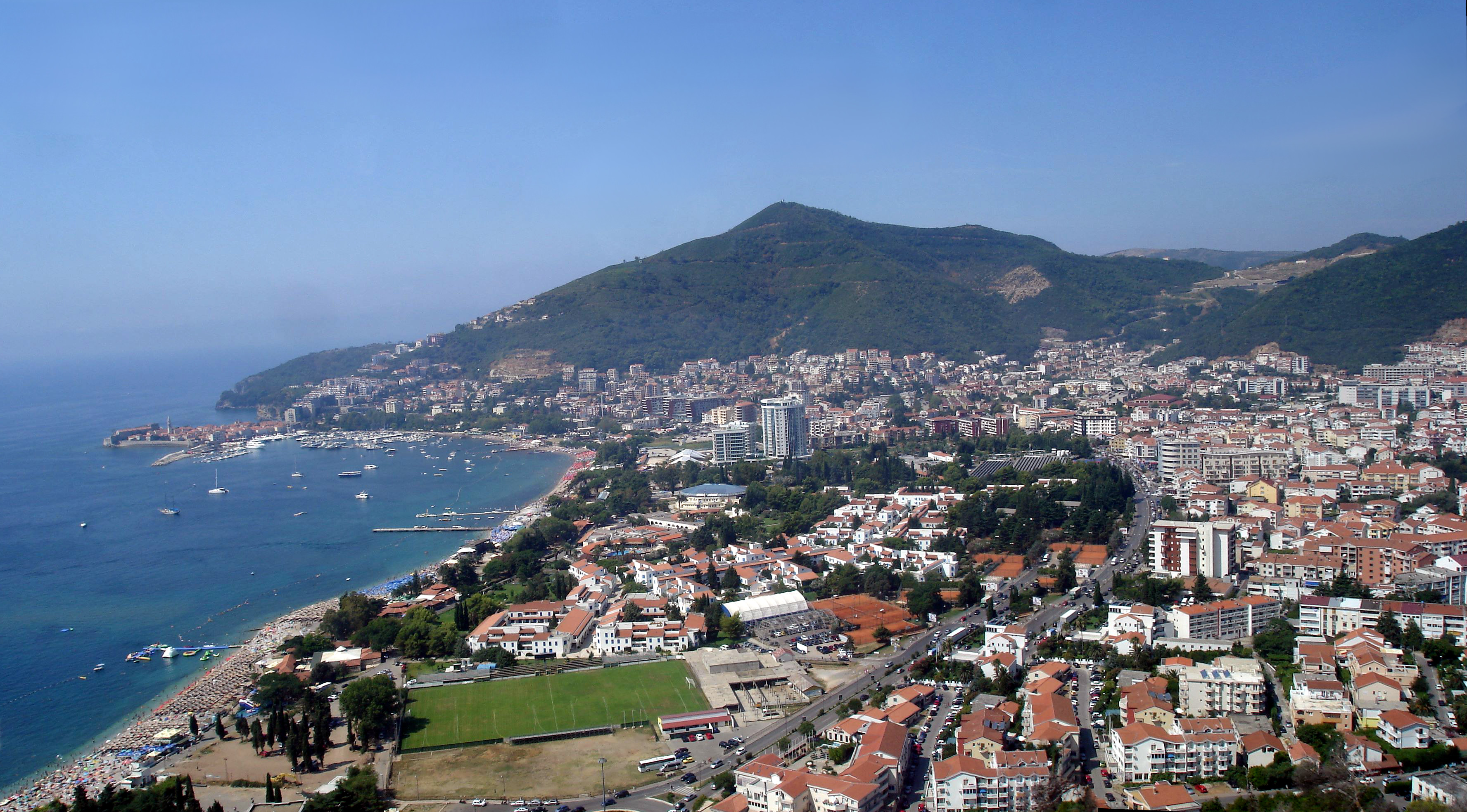 Orașul Budva din Muntenegru văzut de pe șoseaua pe care se coboară de pe muntele ce îl înconjoară